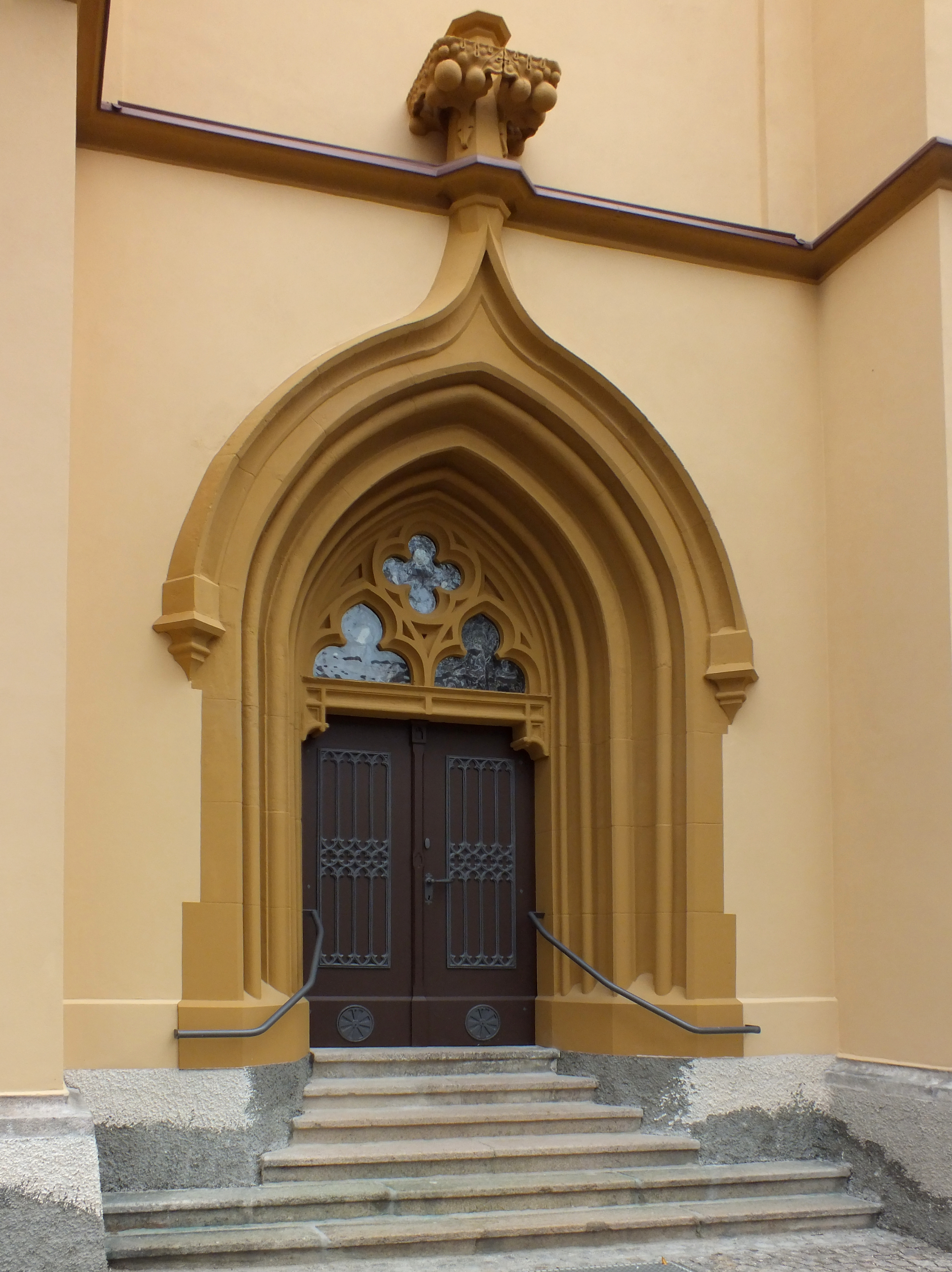 Oberwiesenthal, Martin-Luther-Kirche